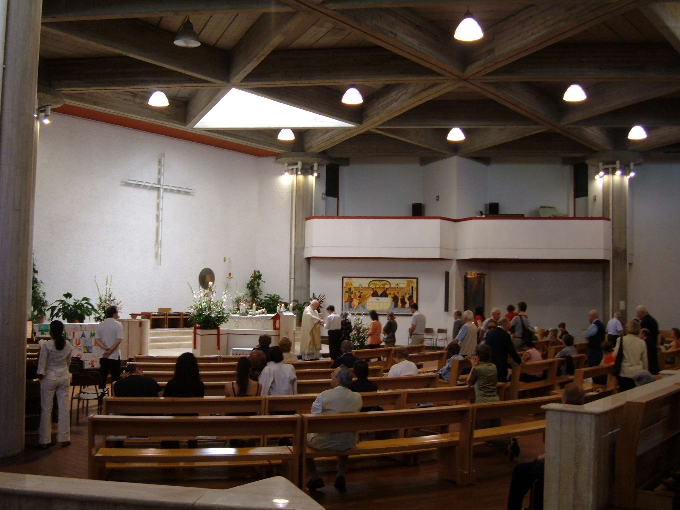 Chiesa della Santissima Trinità, a Roma, nel quartiere Trieste.